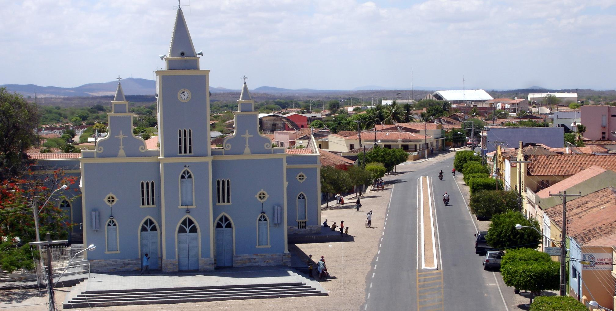 Imagem da Igreja de Jesus, Maria e José em Uiraúna - Pb, palco de muitas visitas, onde pessoas pagam promessas